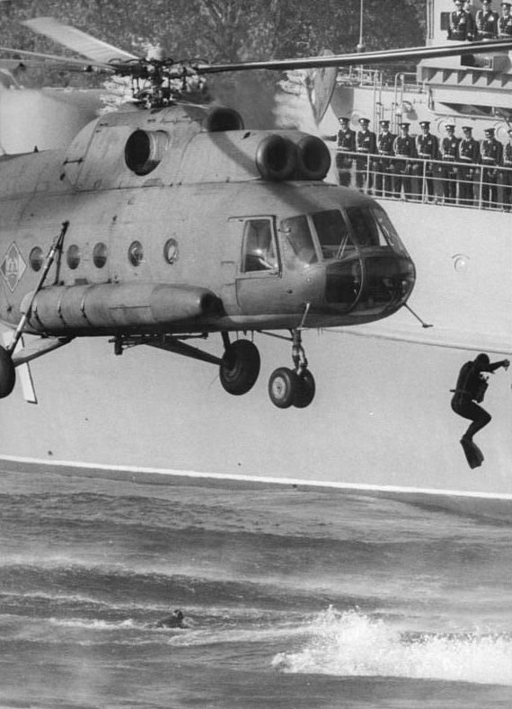 Rostock, 30. Jahrestag DDR-Gründung, Flottenparade ADN-ZB Sindermann 7.10.79 Rostock: Unter dem Beifall der Zuschauer demonstrierten Kampfschwimmer während der militärischen Vorführungen der Flottenparade der Volksmarine ihr hohes Können. Aus Schnellbooten und Hubschraubern tauchten sie in die aufwirbelnden Fluten der Warne. Mit Mut und Entschlossenheit erfüllen diese jungen Männer ihren Kampfauftrag. [Rostock.- Soldat des Kampfschwimmerkommando 18 (KSK-18) bei Sprung aus Hubschrauber Mil Mi-8T "Hip" des Marinehubschraubergeschwader 18 (MHG 18)]